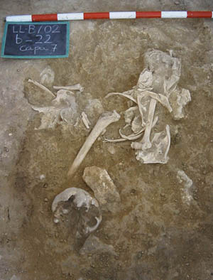 Uno de los esqueletos hallados en la Lloma de Betxí.